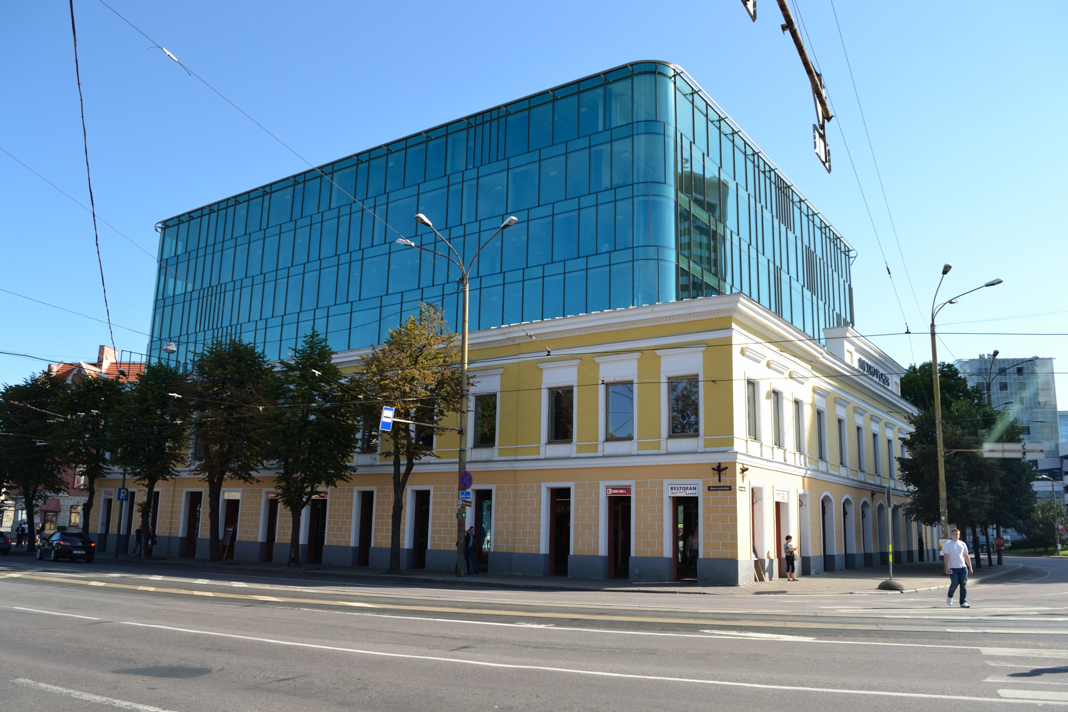 Tallinn, hoone, kus 1872-1917 asus Tallinna Aleksandri Gümnaasium